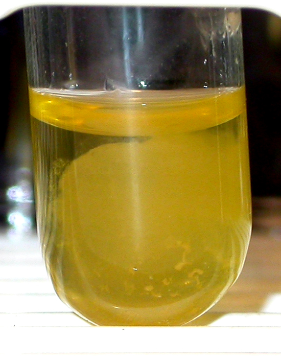 Caillot de fibrine formé par la coagulase de S.aureus